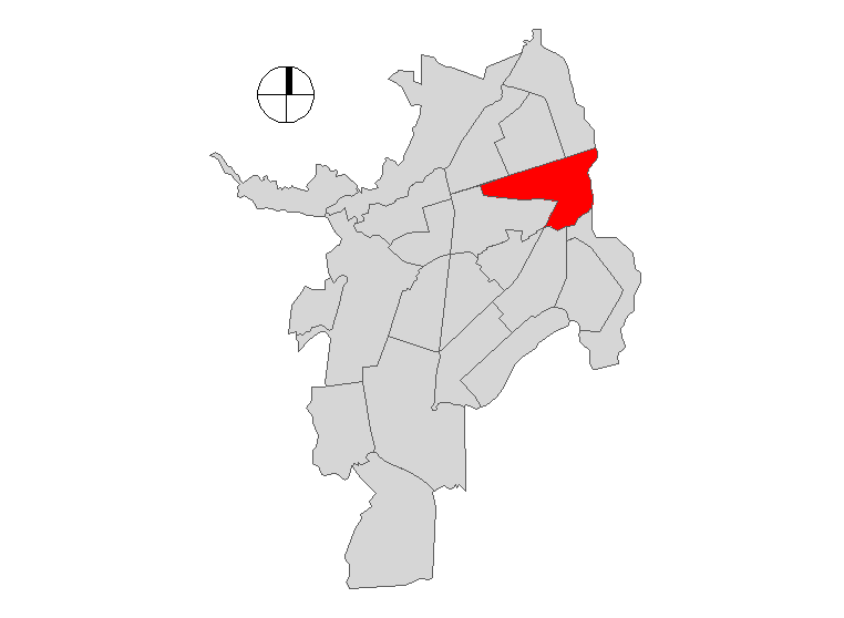 Comuna 7 de Santiago de Cali, Colombia.